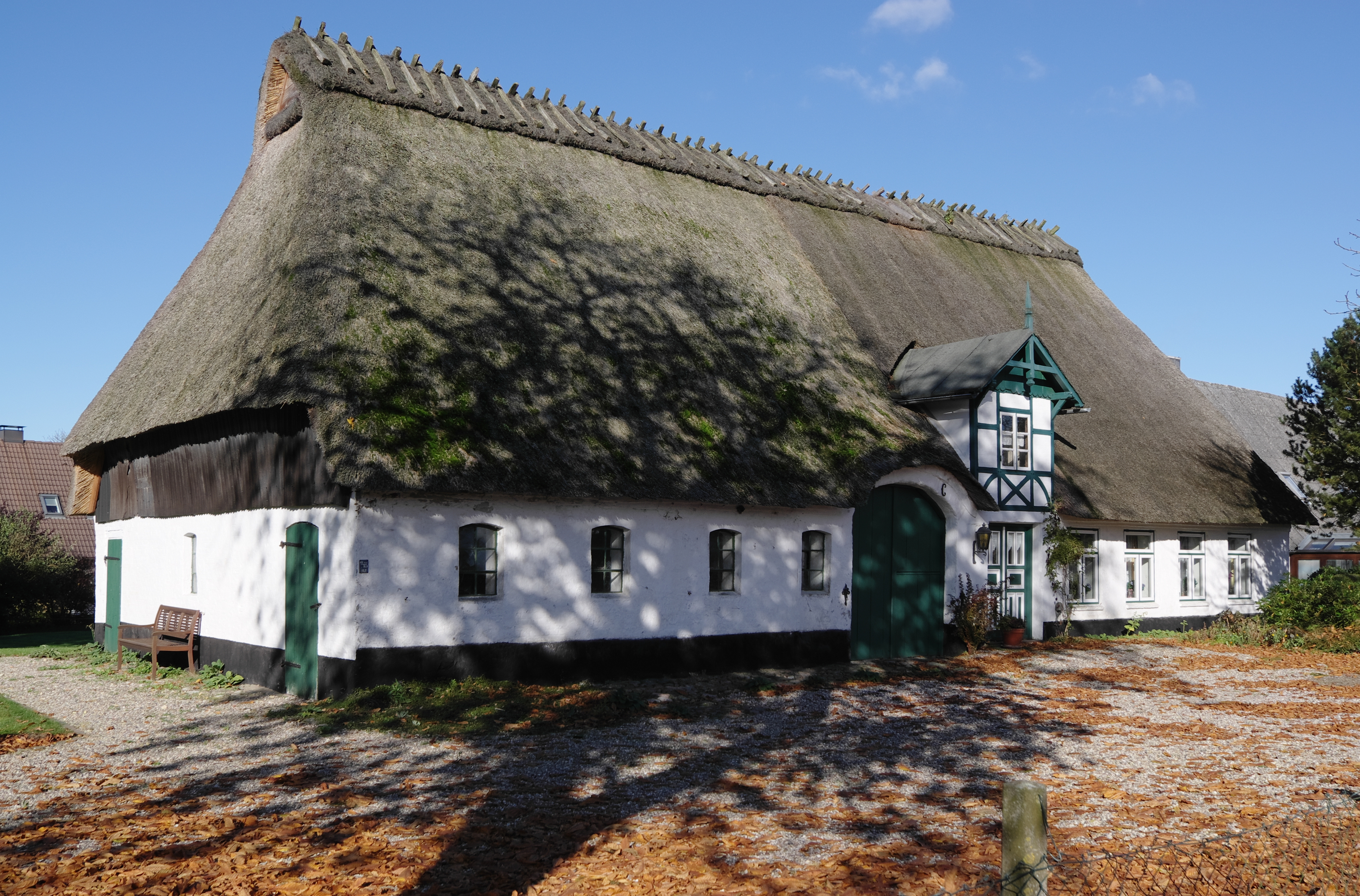 Denkmalgeschütztes Bauernhaus (ehem. Kolonistenstelle) in Neuberend, Kreis Schleswig-Flensburg.